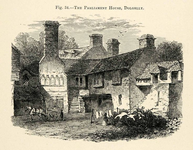 Senedd-dy Glyndŵr Dolgellau